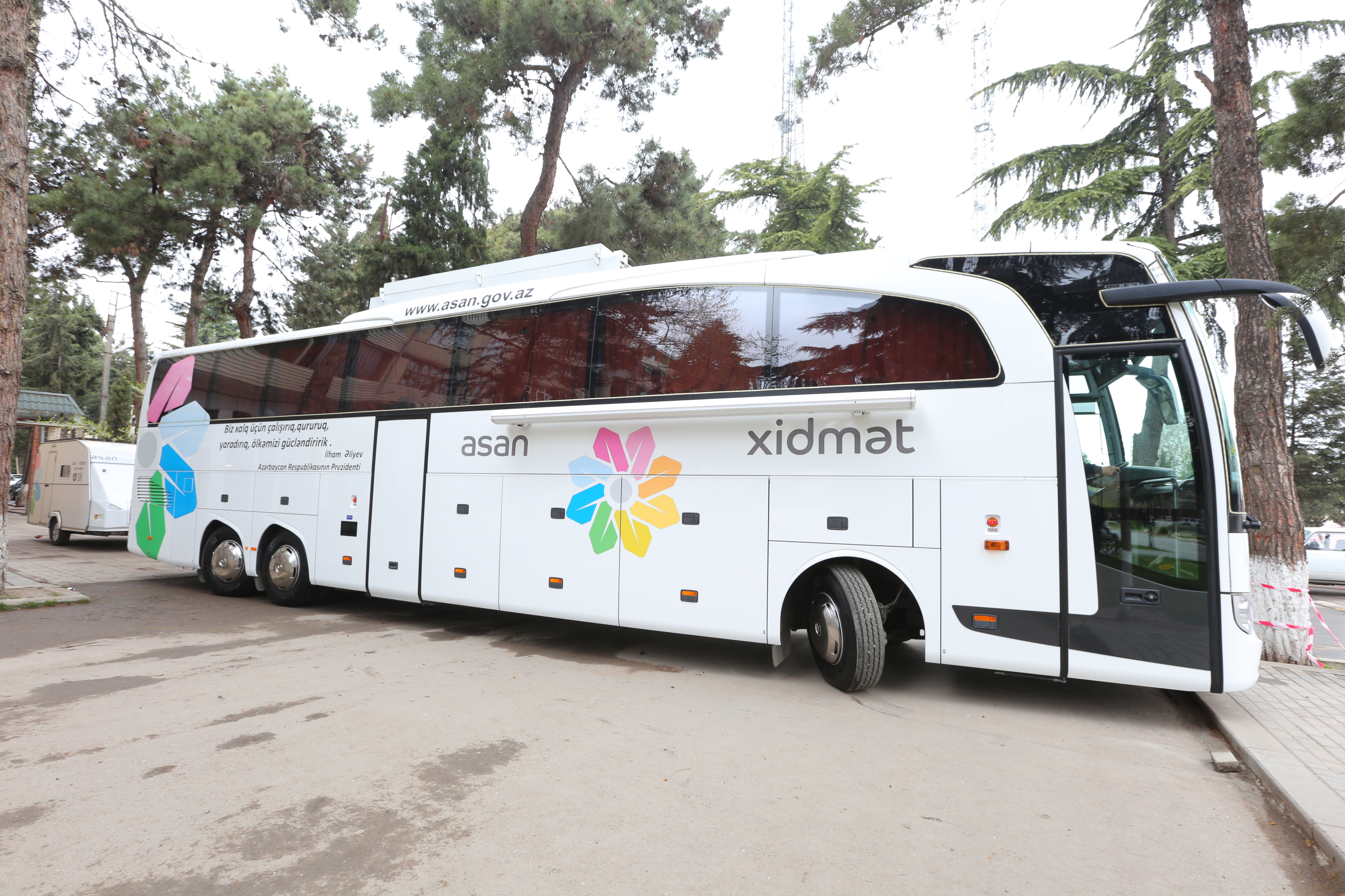 ASAN xidmət